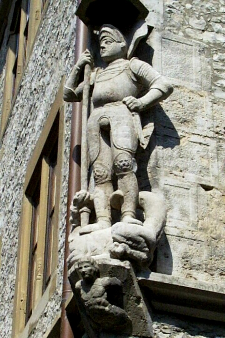 Figur des hl. Georg am Rathaus Marktbreit